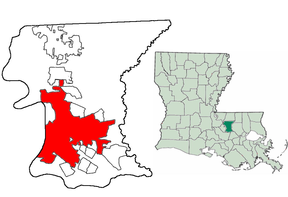 Made Using US Census Bureau Data.